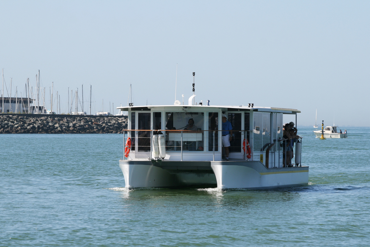 Le Copernic, bus de mer électro-solaire à La Rochelle